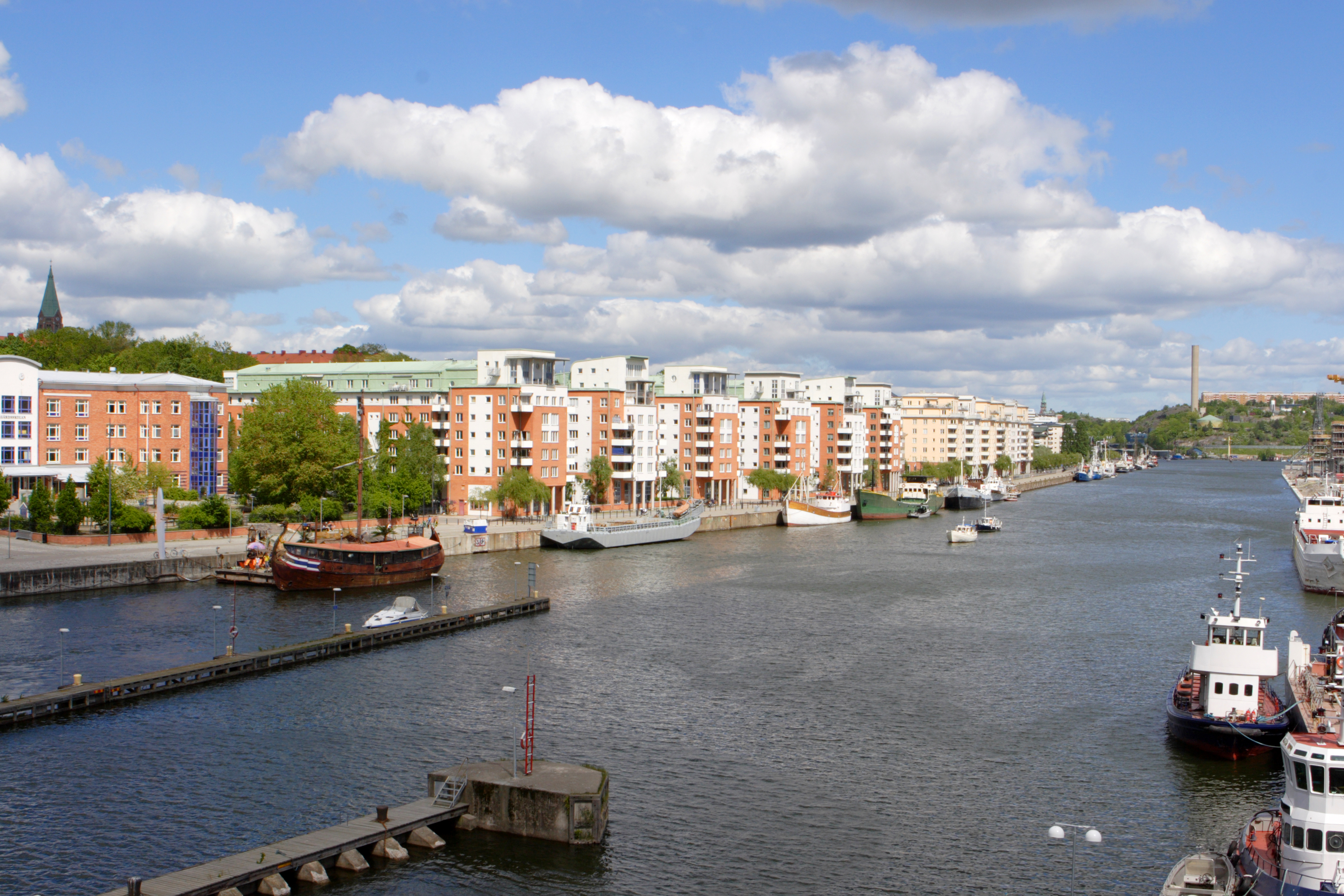 Norra Hammarbyhamnen in Stockholm, Sweden. Picture taken 2006-06-05.